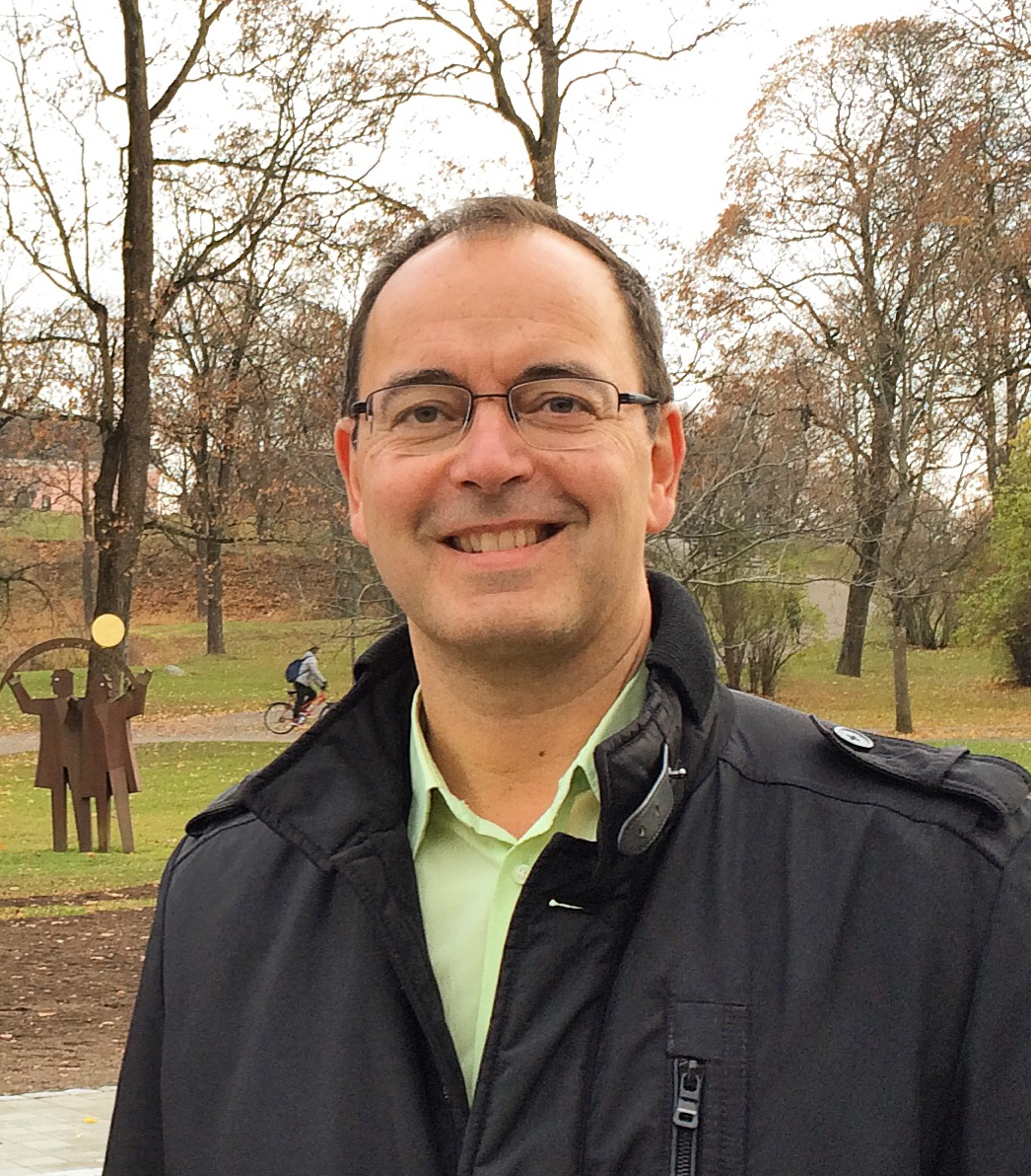 Stefan Hanna i Slottsbacken, Uppsala